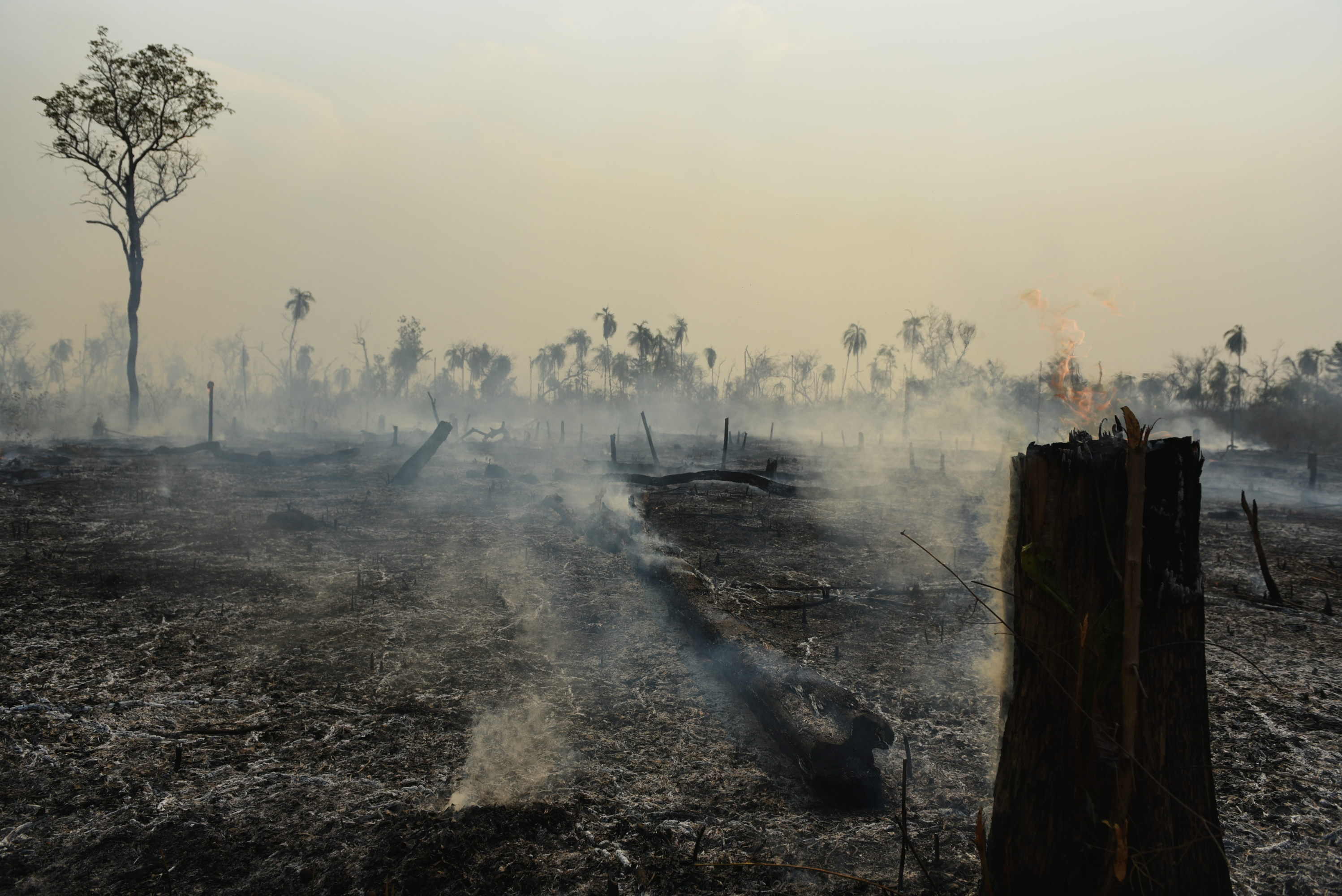 Brigadas indígenas do Prevfogo/Ibama combatem incêndio florestal na Terra Indígena Porquinhos, no Maranhão Foto: Felipe Werneck/Ibama